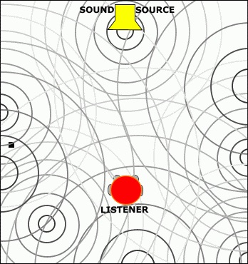 Ääni kaikuu palloaaltoina seinistä